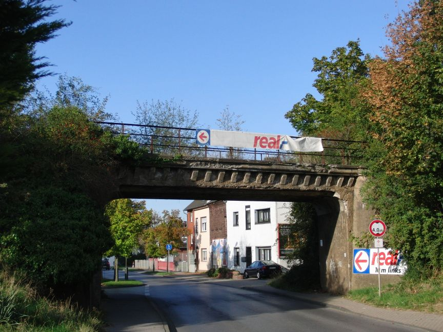 Brücke der ehemaligen DKB-Ringbahn über den Arnoldsweilerweg